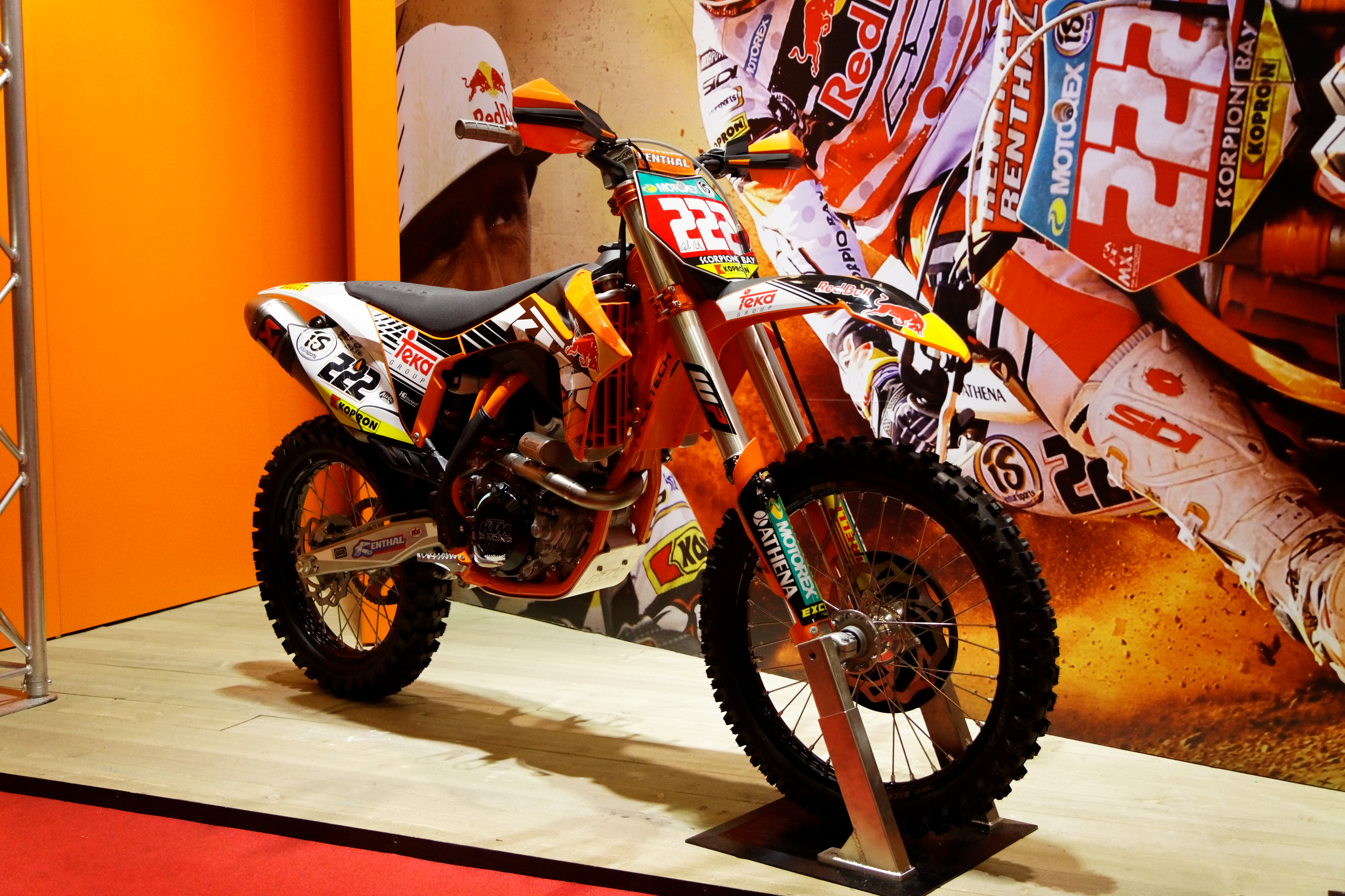 KTM - 350 SX-F LTD Edition Tony Cairoli